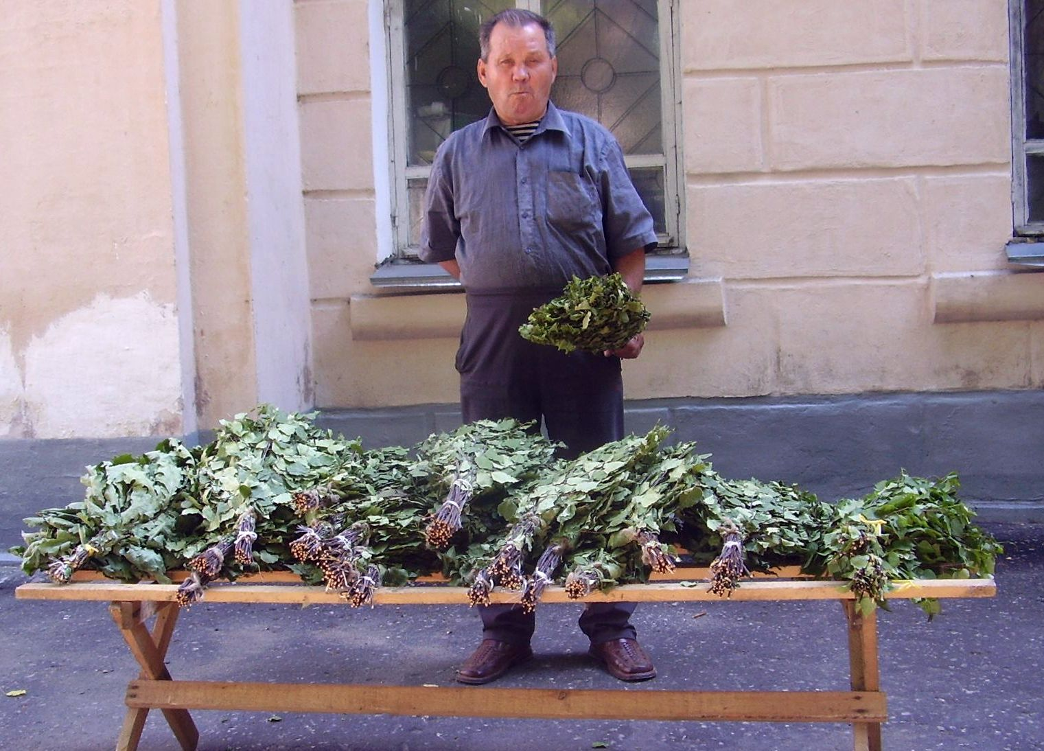 Продажа банных веников в городе Йошкар-Ола.